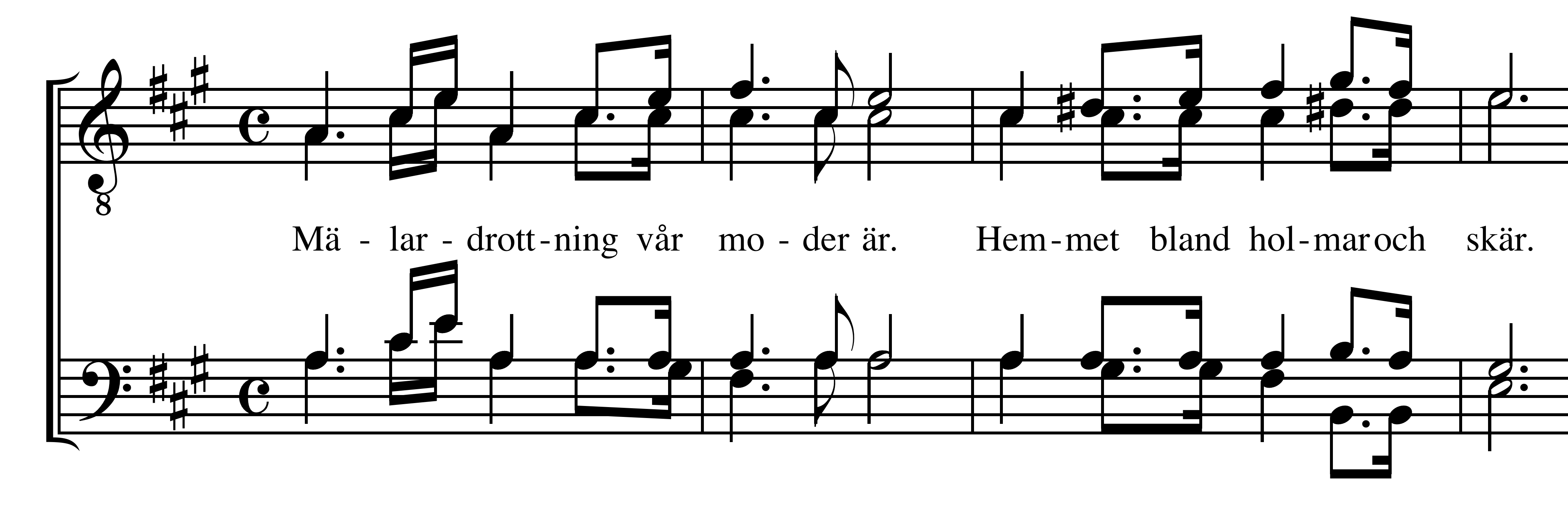 Music example, first bars of "Mälardrottning" by Karl Hellström and Otto Olsson.